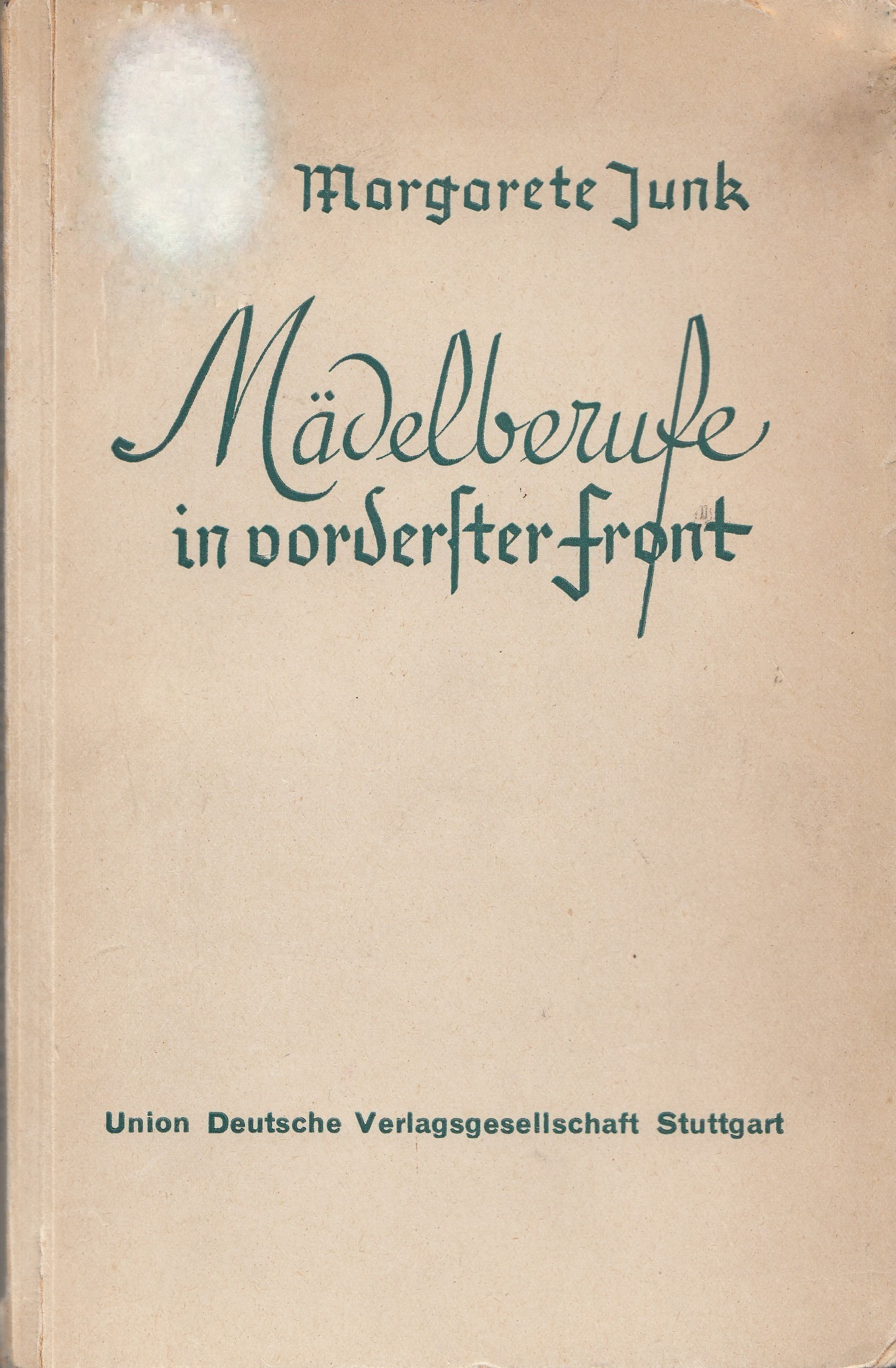 Publikation aus dem Jahre 1940 von Margarete Junk